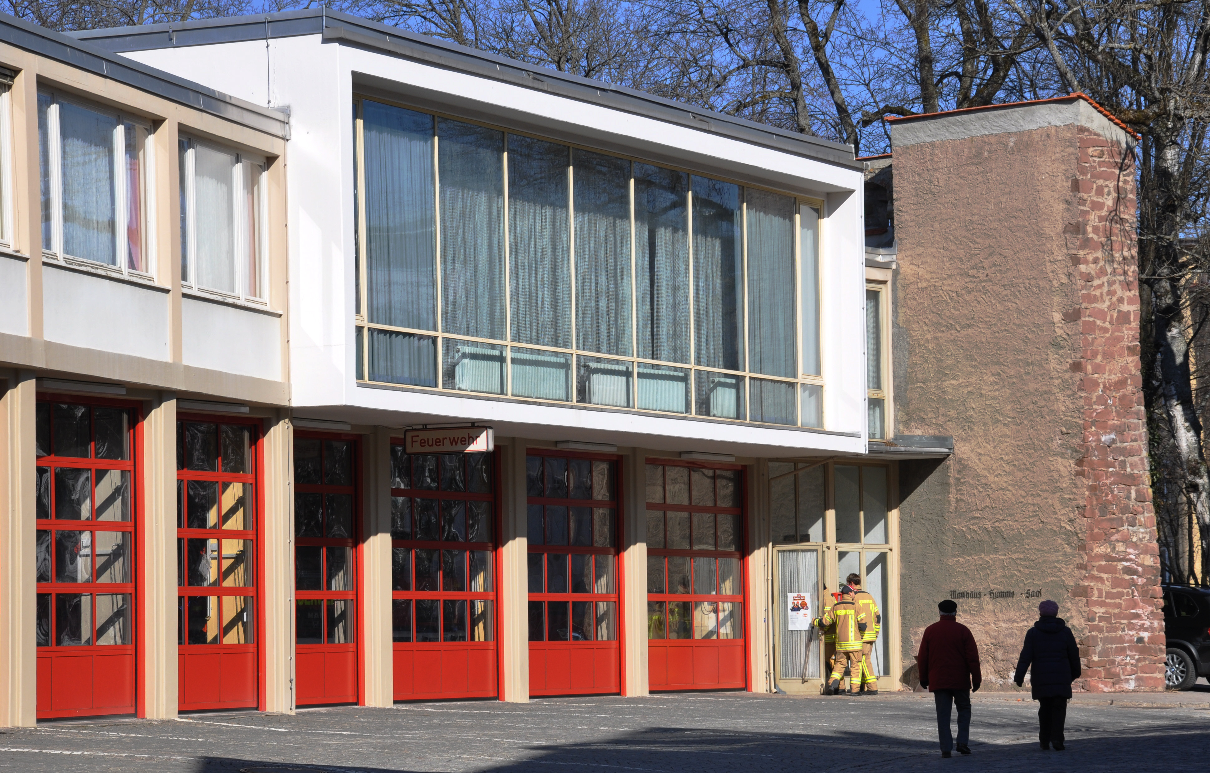 Villingen-Schwenningen, Stadtbezirk Villingen Feuerwehrhaus und Stadtmauer